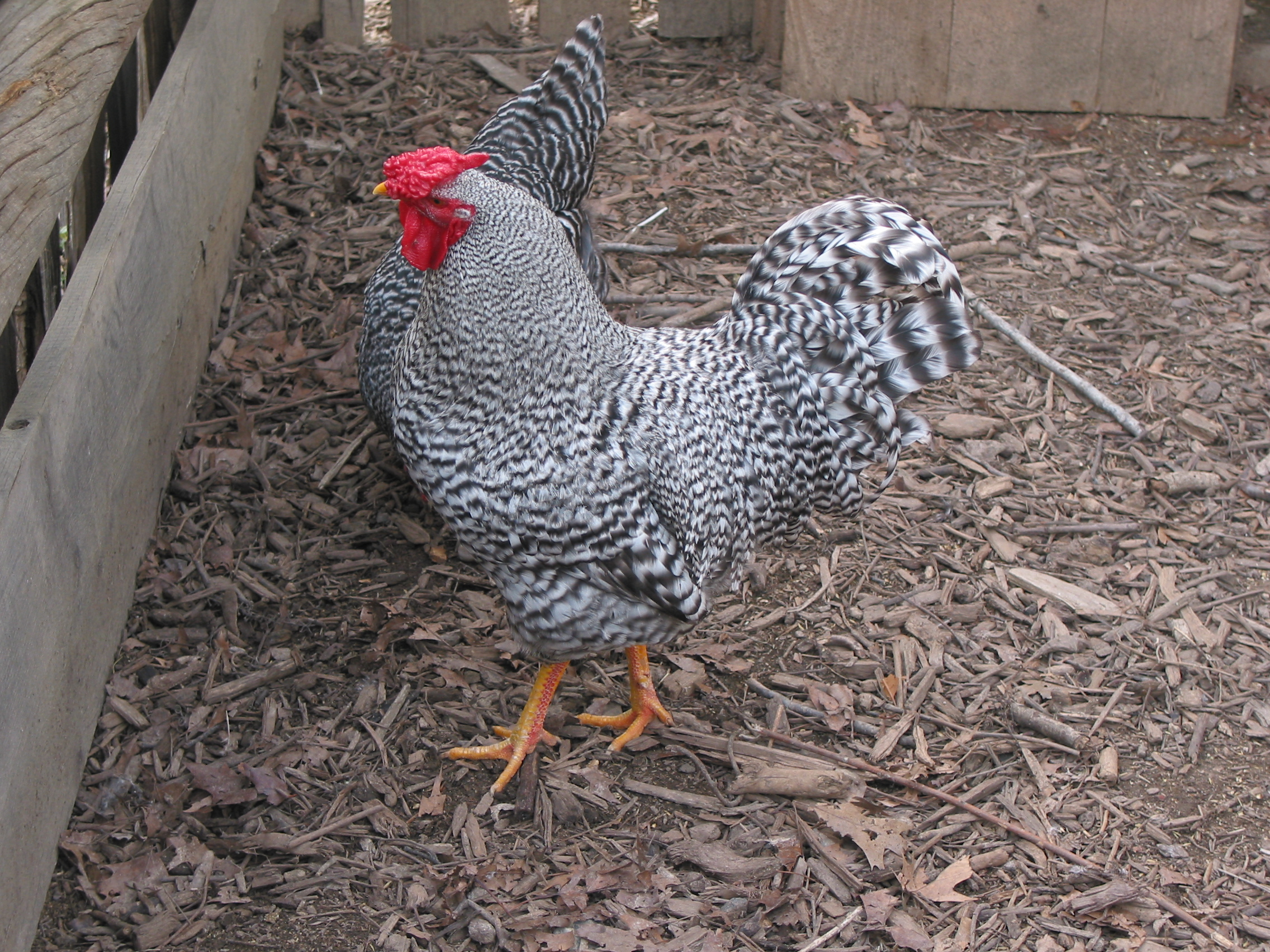 A Dominique rooster at Mt. Vernon.